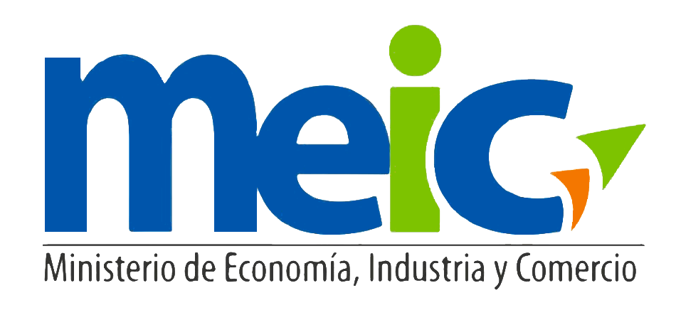 Logo del Ministerio de Industria y Comercio (MEIC), Costa Rica.